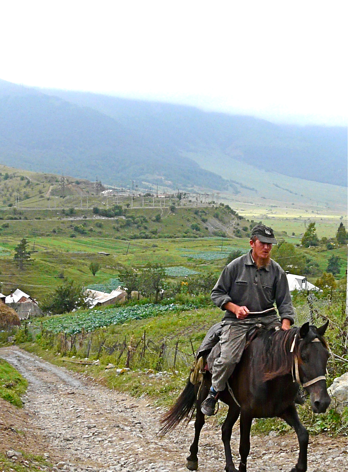 Molokan villager